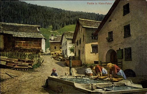 Brunnenszene in Ftan Pitschen (Unterengadin)